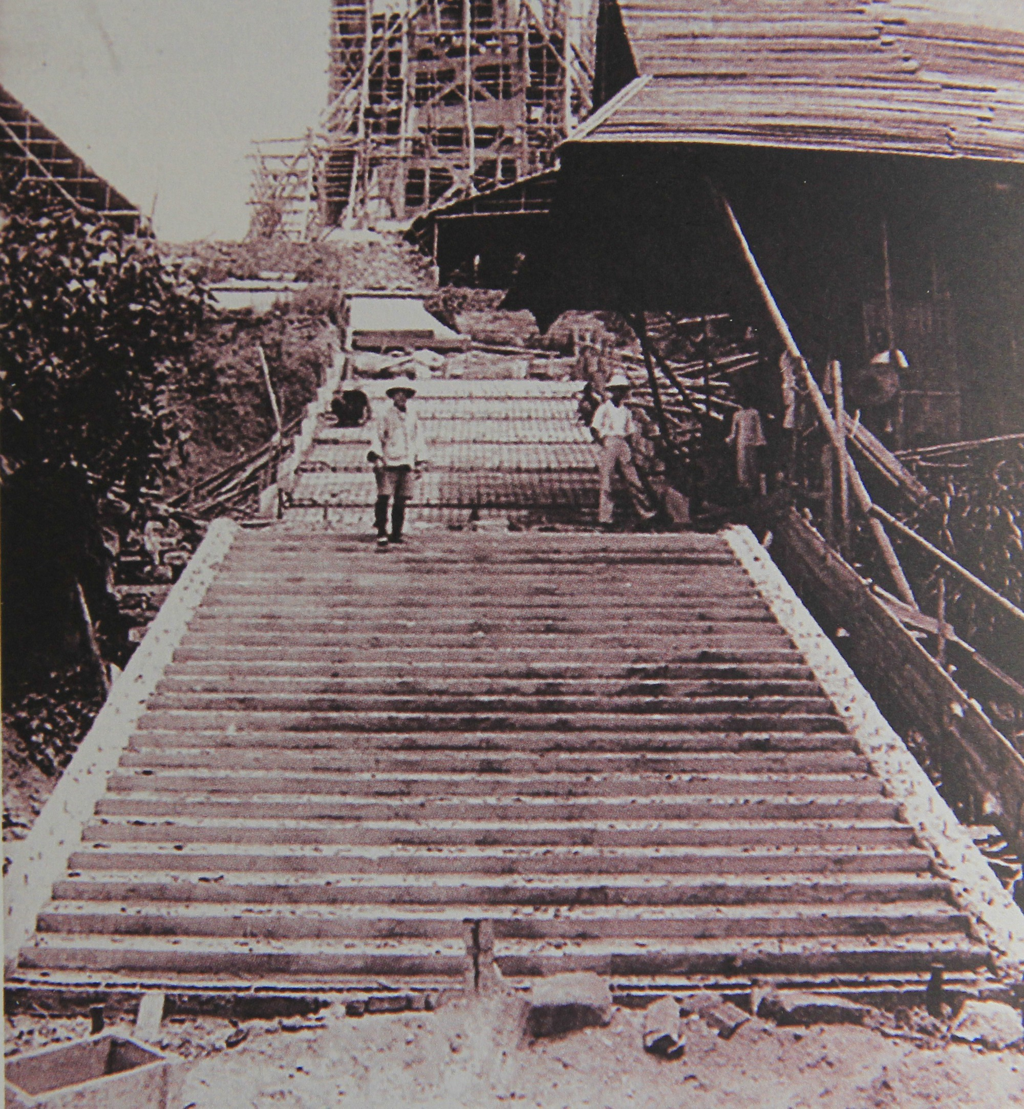 廣州市觀音山（越秀山）。正在興建中的中山紀念碑及百步梯。